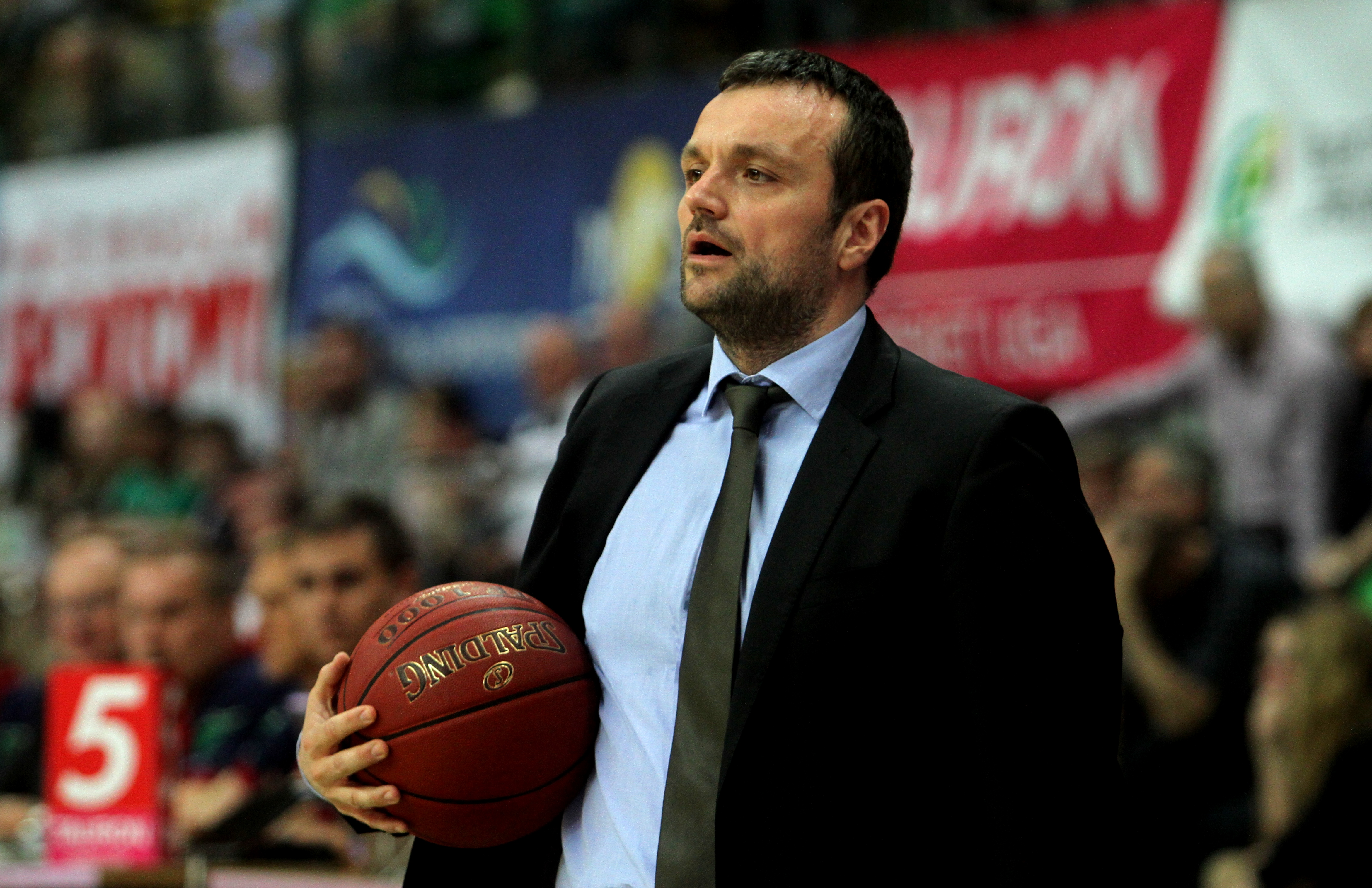 Mihailo Uvalin Stelmet Zielona Góra